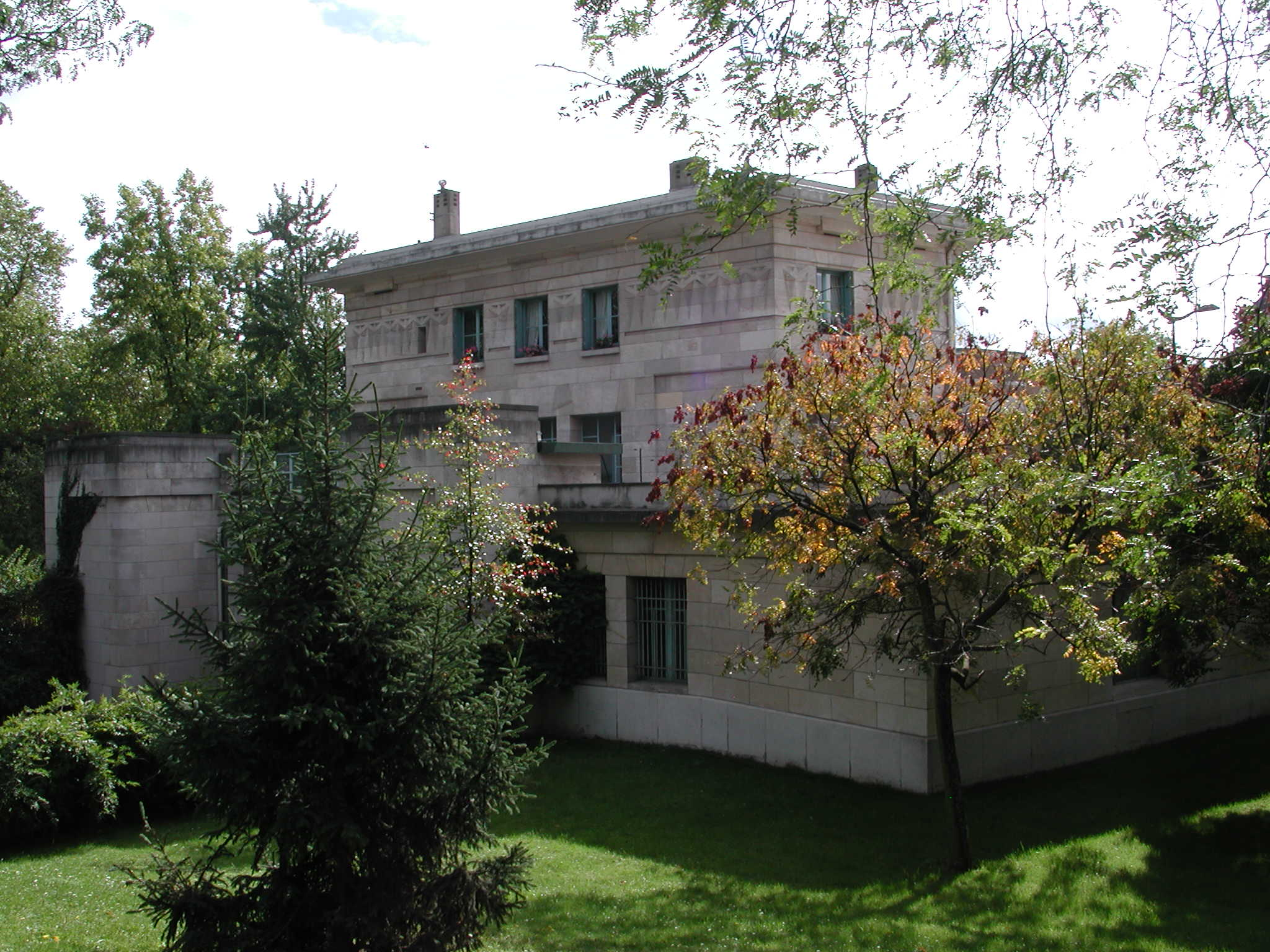 station de métro Cité Universitaire, RER B parc Montsouris, Paris, France